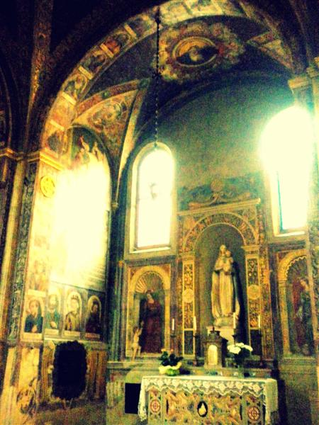 La cappella della Carità nella chiesa di San Francesco Grande a Padova